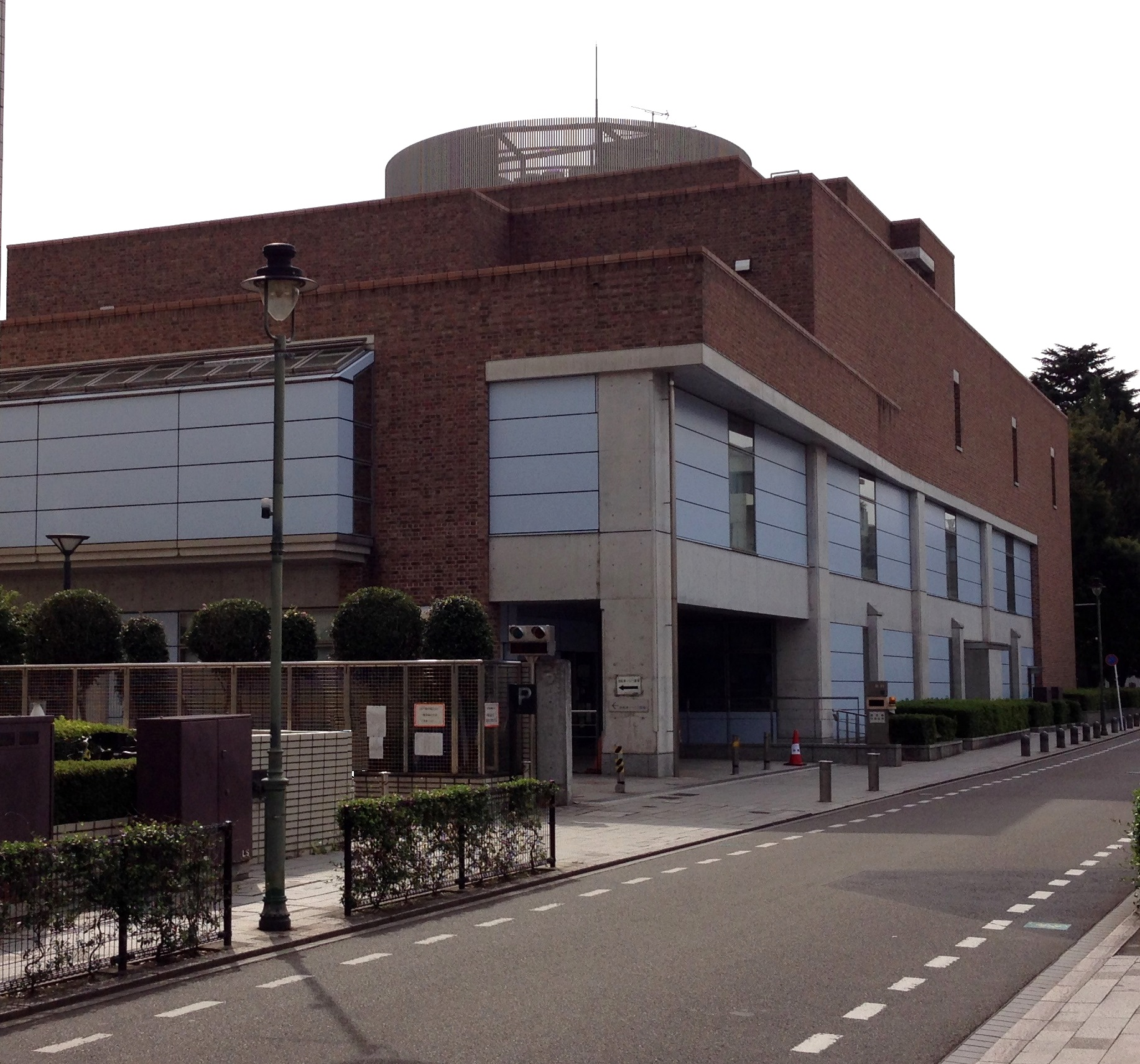 武蔵野市立中央図書館（東京都武蔵野市）